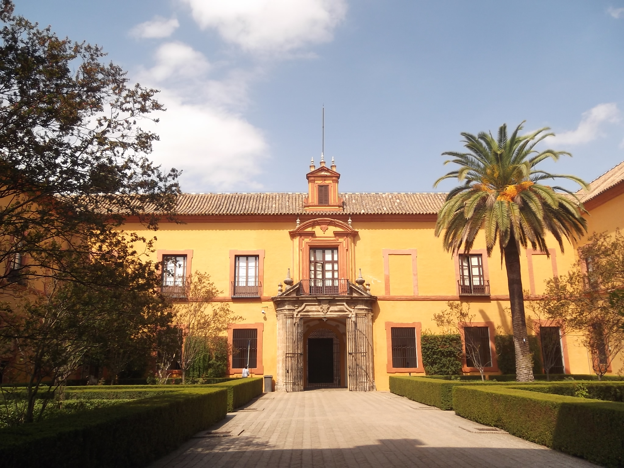 القصر الملكي في إشبيلية (القصر القوطي).